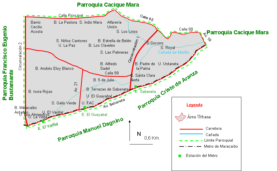 Mapa de la Parroquia Cecilio Acosta. Municipio Maracaibo. Estado Zulia. Venezuela